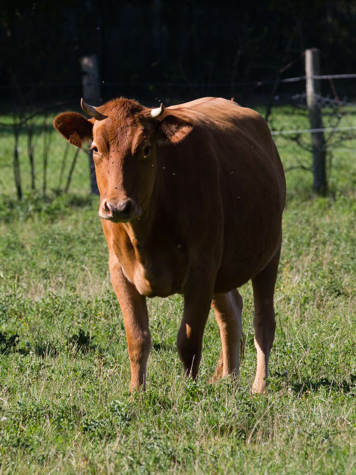 Vache Froment du Léon à l'Écomusée du pays de Rennes.